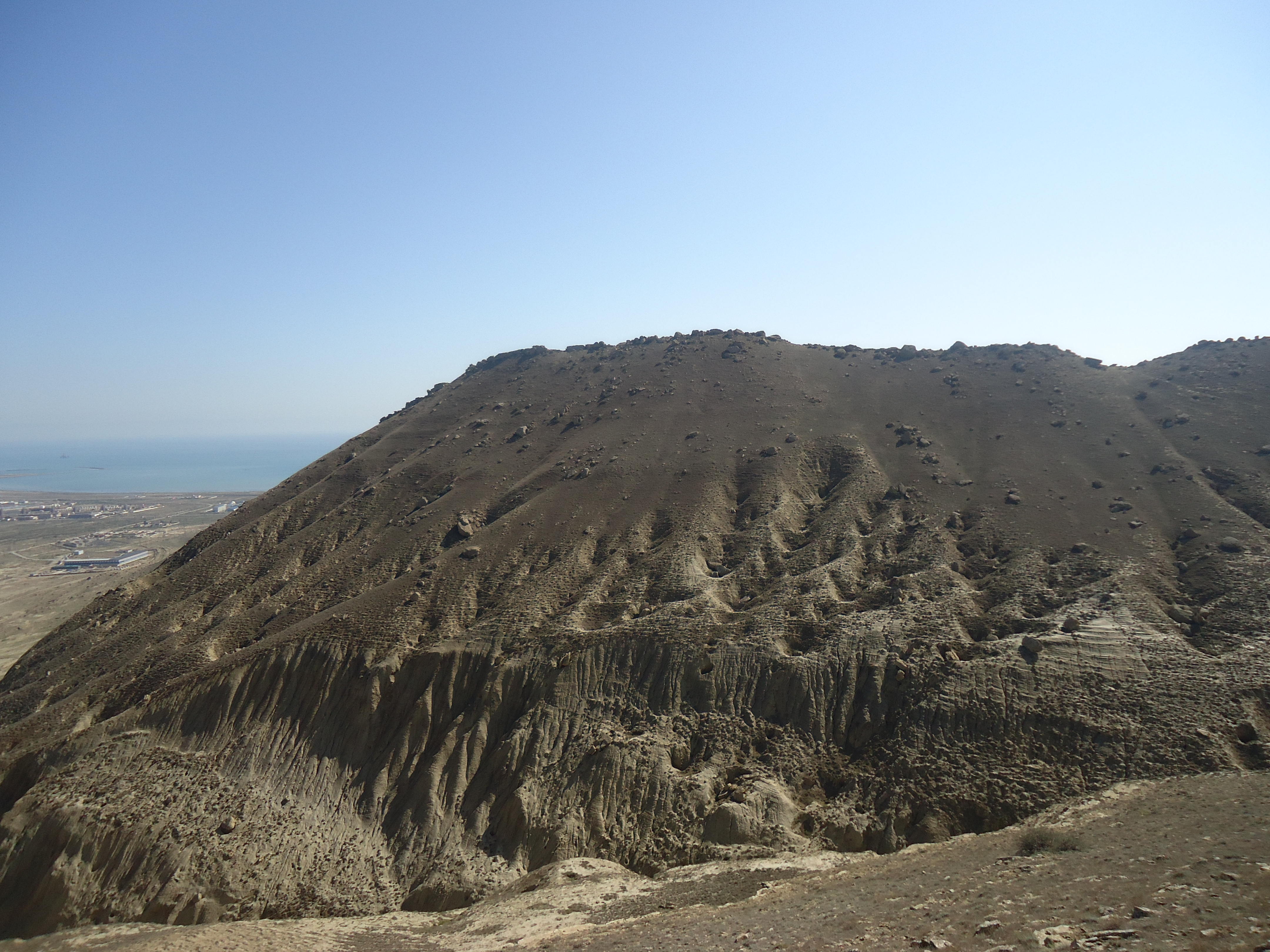 Bakı qulaqları (Kərkəs dağı) – Puta burnundan 8,5 km qərb, şimal-qərbdə yerləşən iki yüksəklikdən ibarət dağ